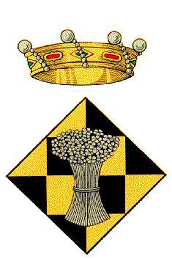 Escut oficial que utilitza l'Ajuntament de Linyola.